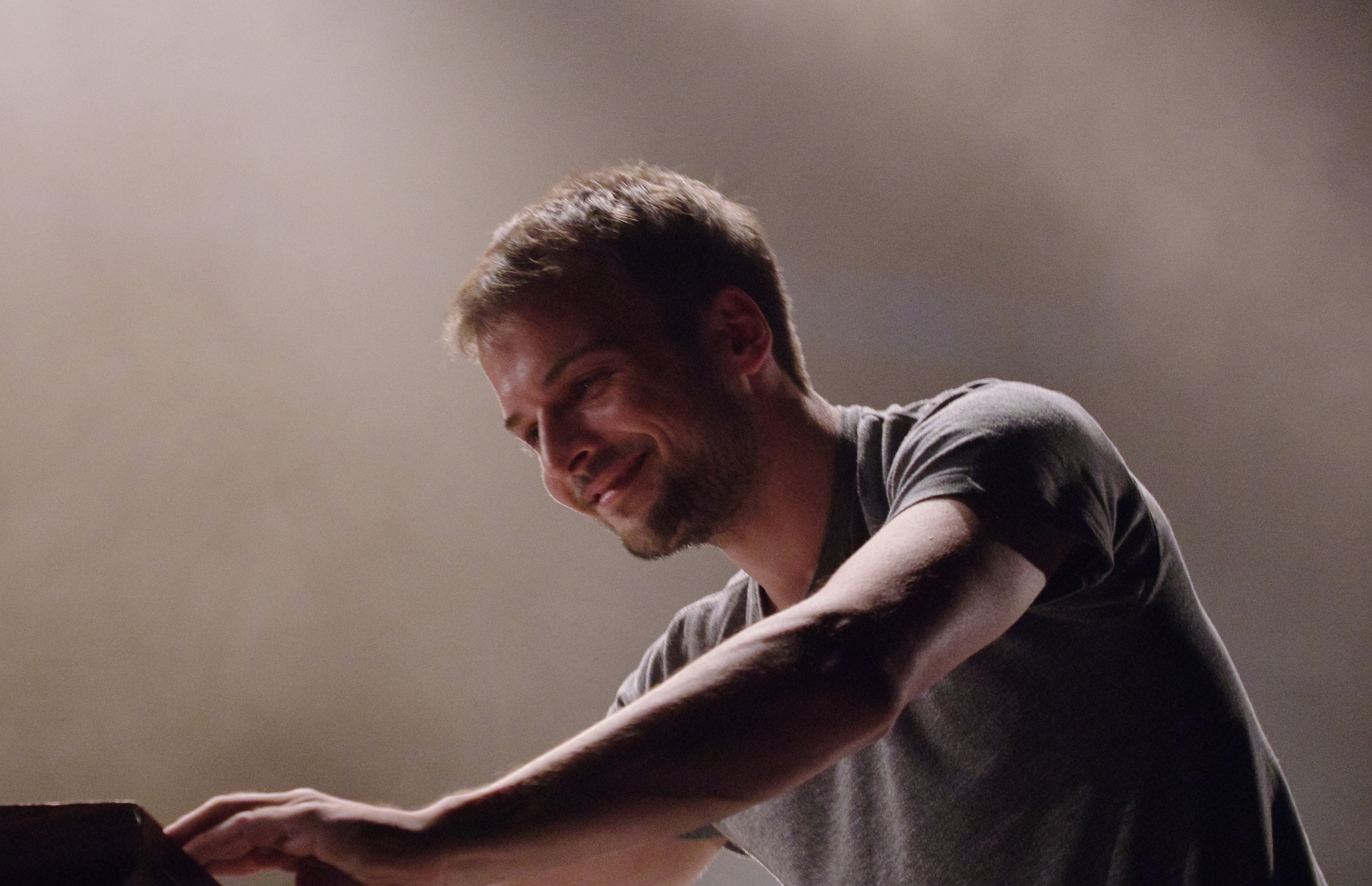 Nils Frahm beim Traumzeitfestival 2014 im Landschaftspark Duisburg Nord